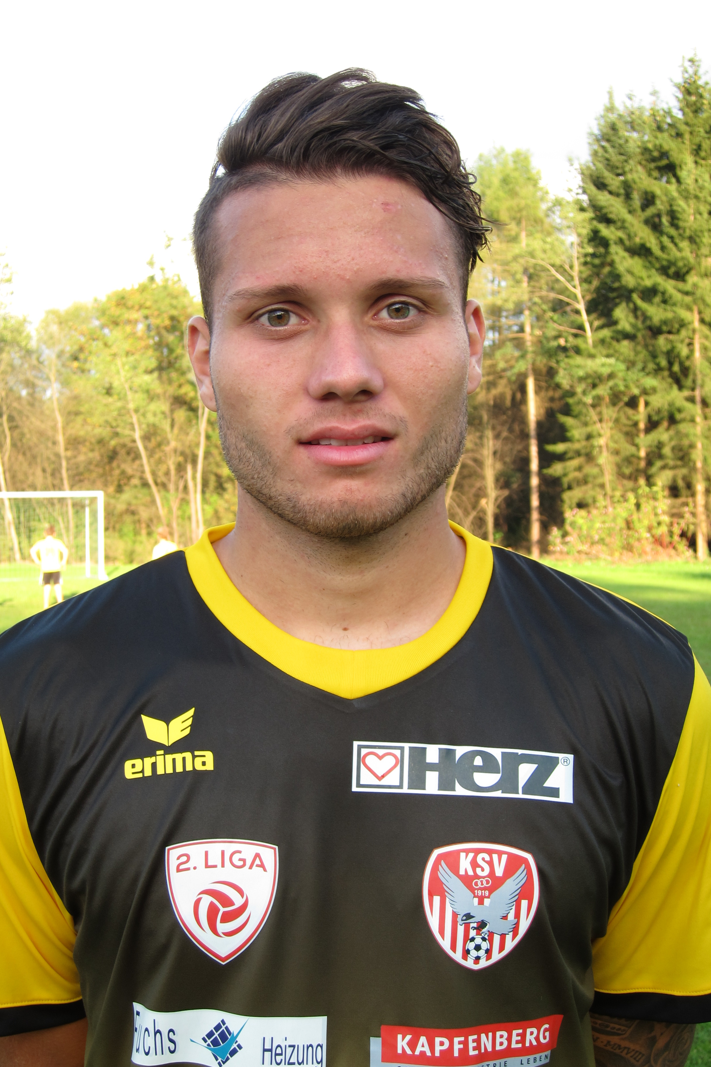 Marco Gantschnig (KSV)